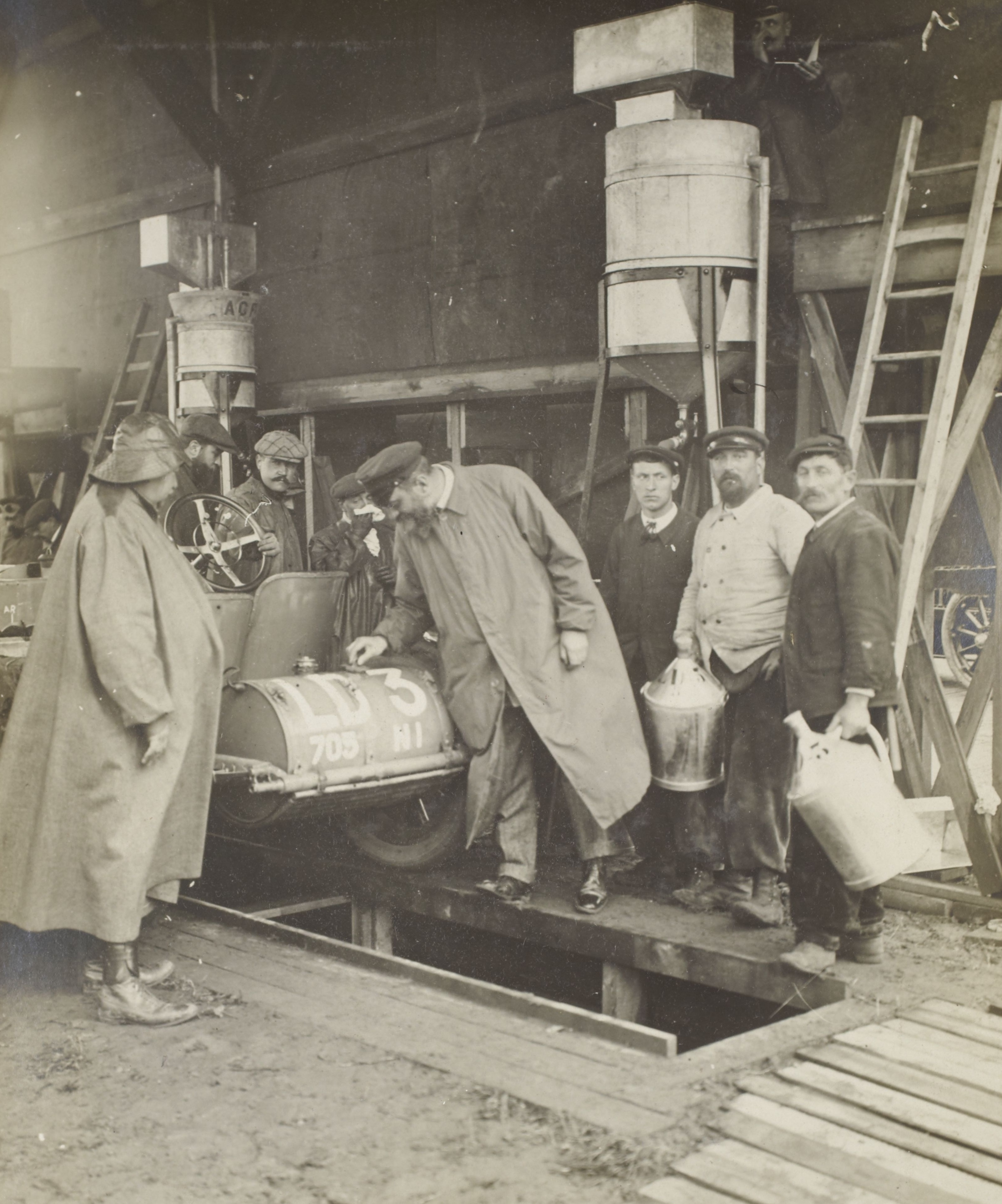 [Collection Jules Beau. Photographie sportive] : T. 34. Années 1907 et 1908 / Jules Beau : F. 6v. [Grand Prix de l\' A. C. F. [Automobile Club de France], Coupe de la Commission sportive, 2 juillet 1907]